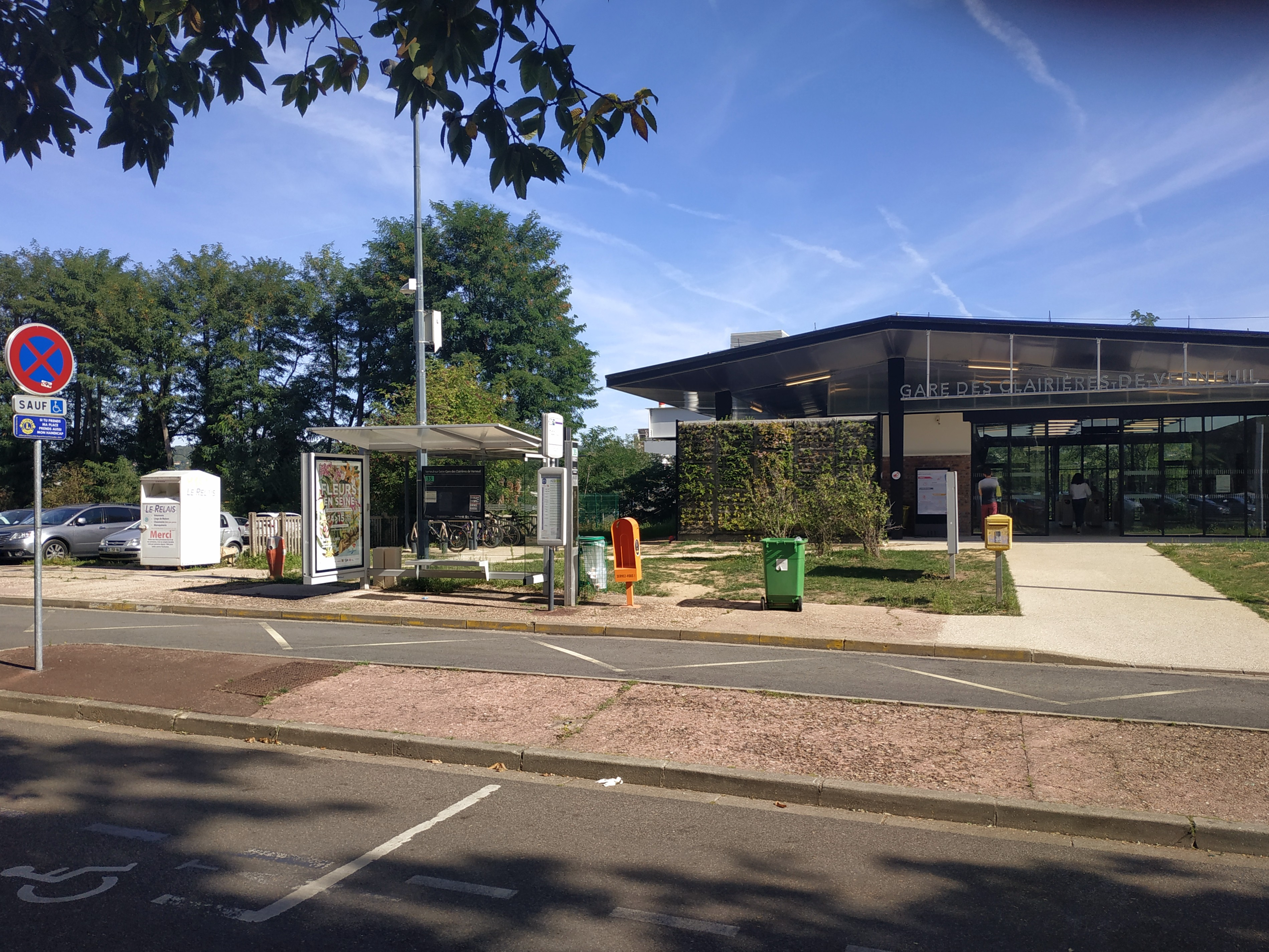 Arrêt de bus gare des Clairières de Verneuil.